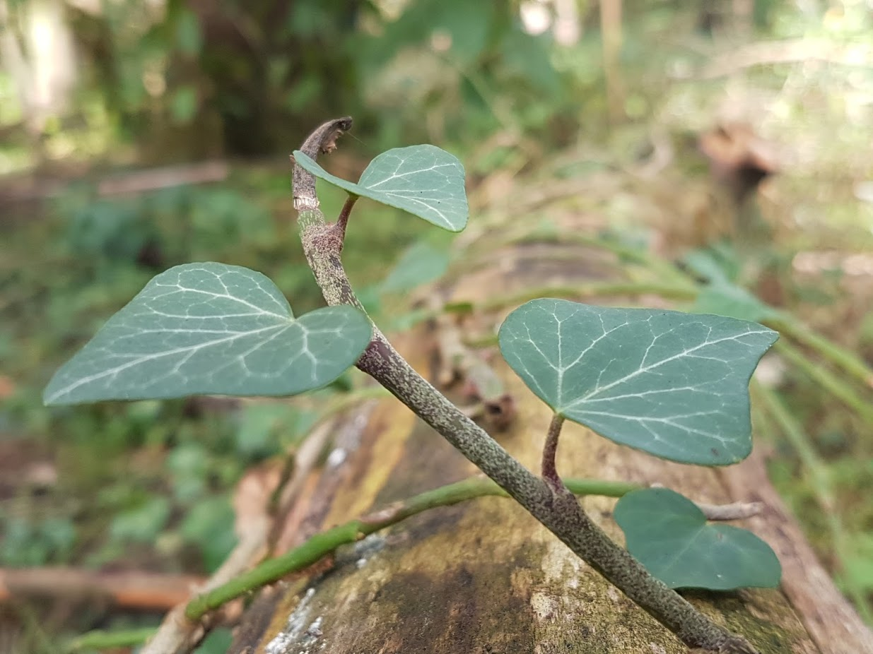 Efeu blätter auf Baumstamm im Wald